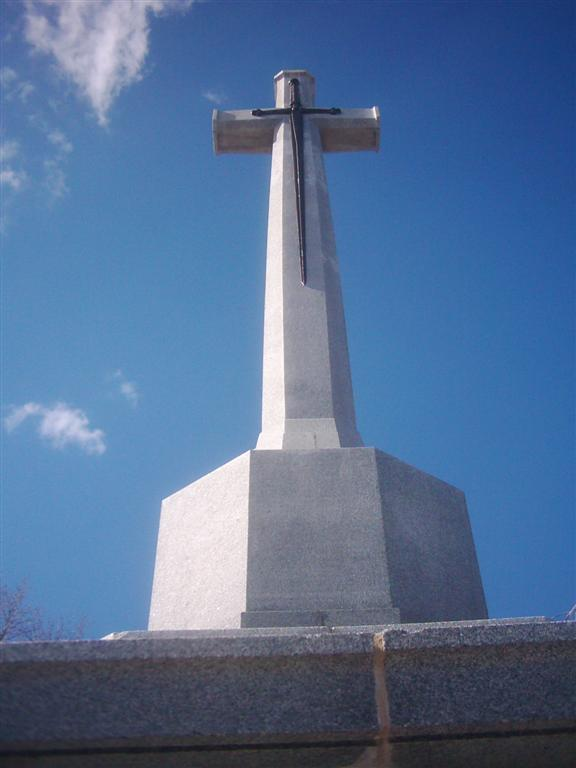 Mémorial au bord de la mer